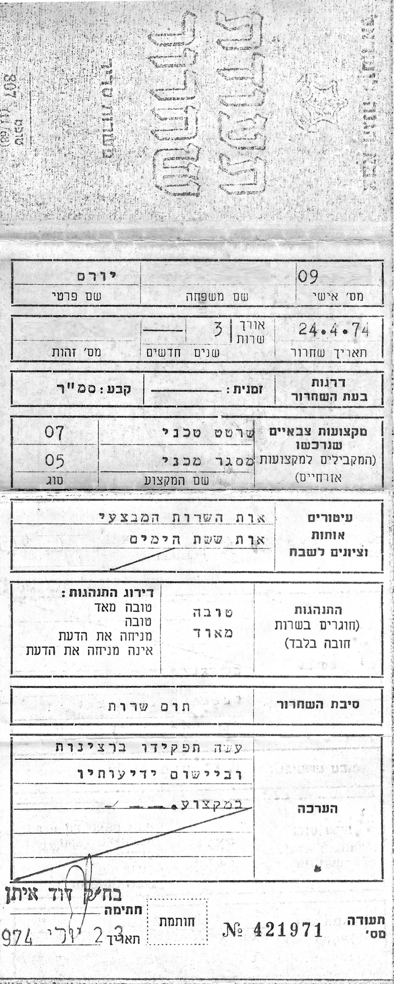 תעודת שחרור משירות סדיר